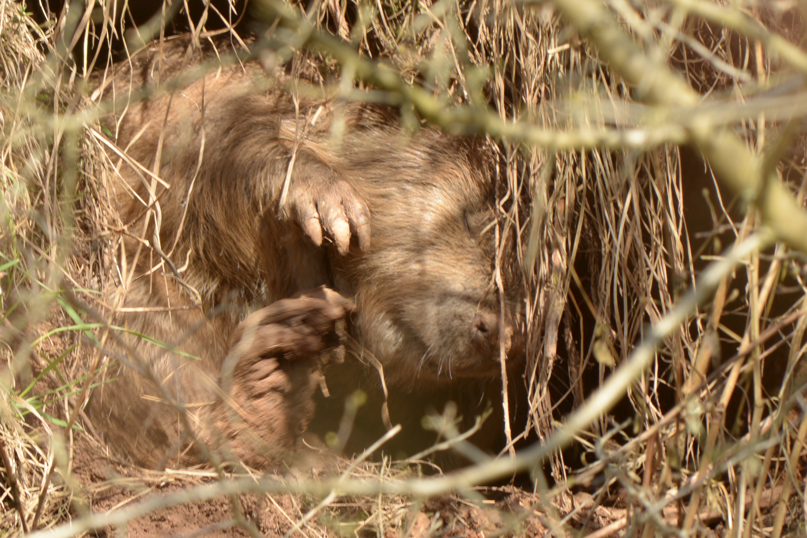 Biber an der Merch in Illingen, Saarland/ Deutschland (2013).